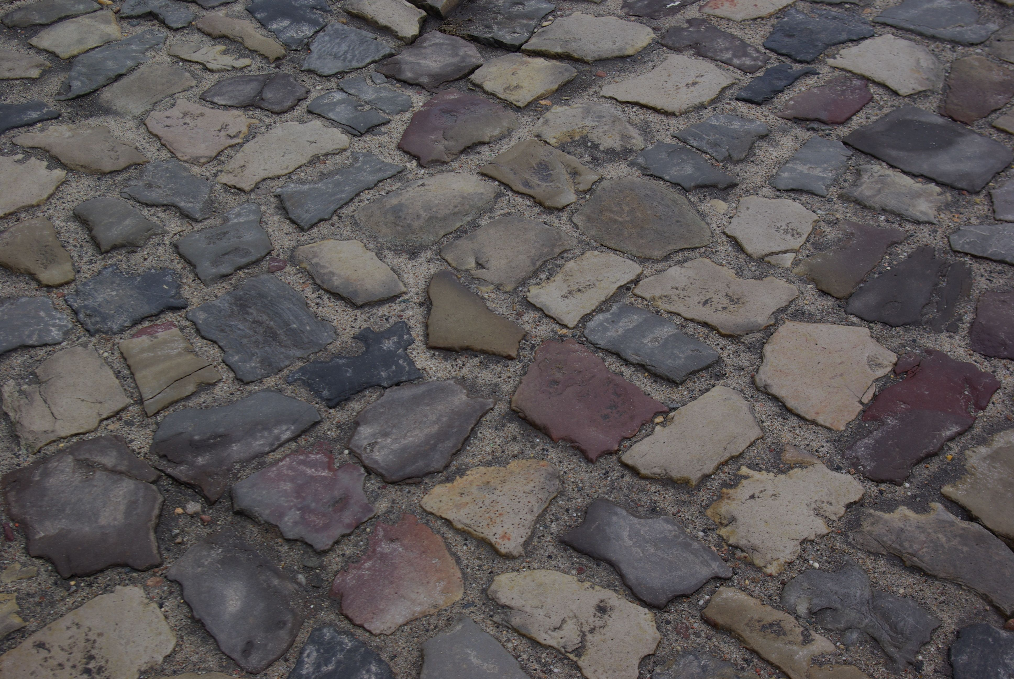 Görzke, Landkreis Potsdam in Brandenburg. Das Pflaster in der Breite Straße steht unter Denkmalschutz. geotags in den exif-daten.